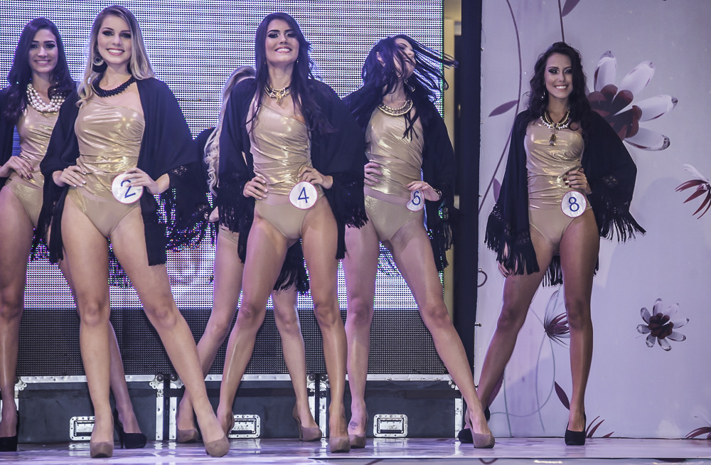 Shopping Mestre Alavaro. 20/08/2014